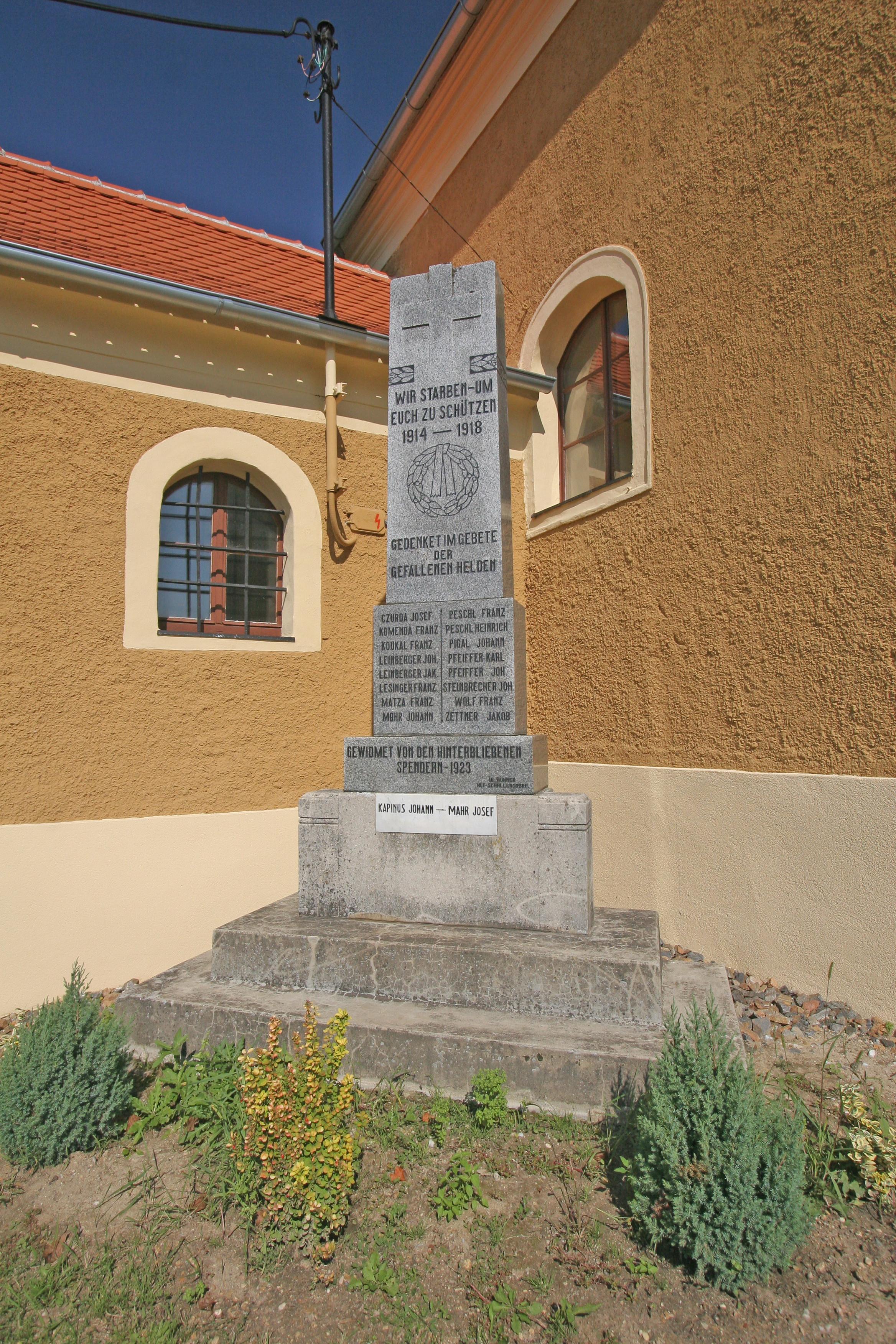 Chvalatice pomník padlých